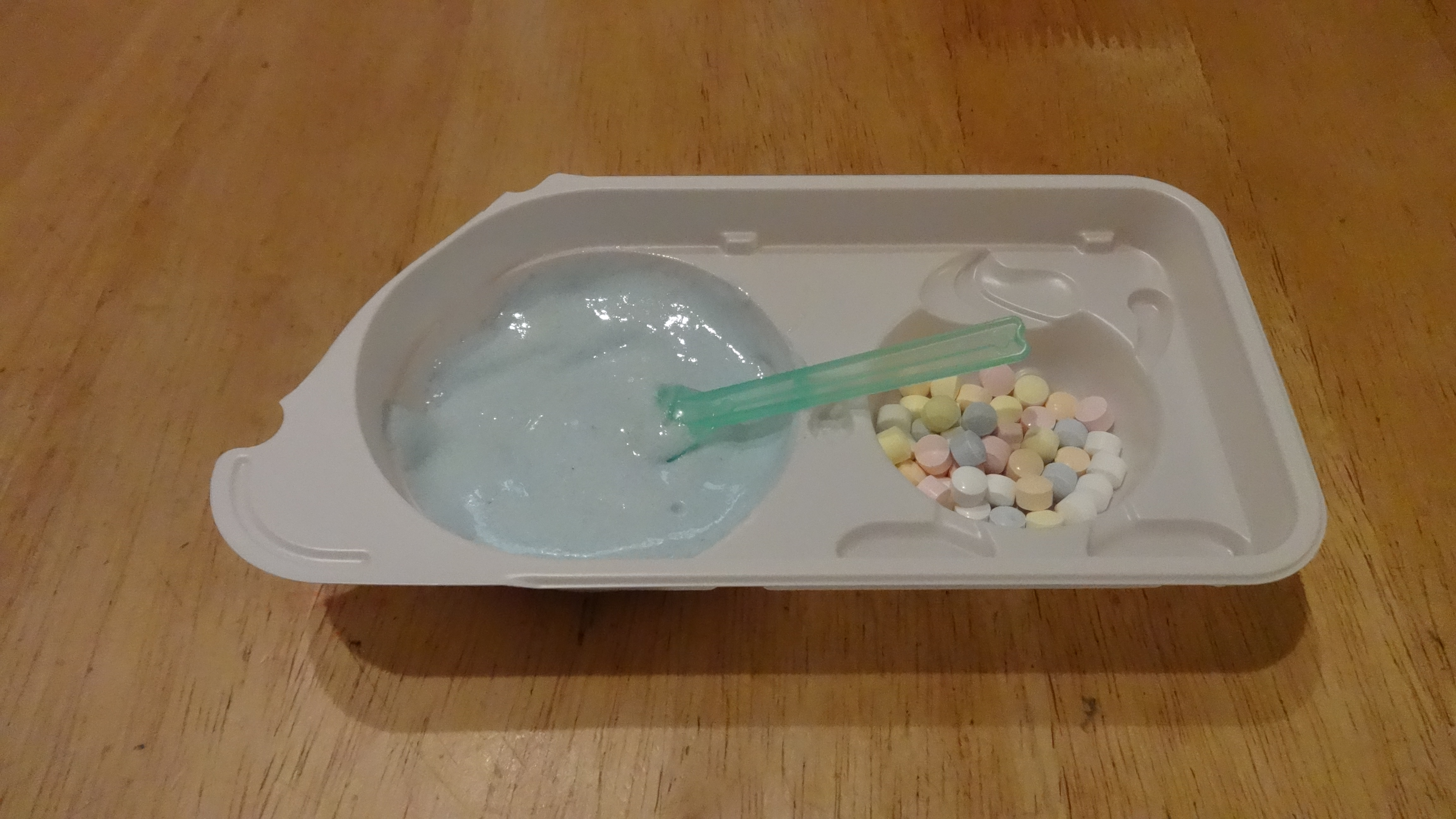 投稿者自身による作品。ねるねるねるねを作っている際の写真。